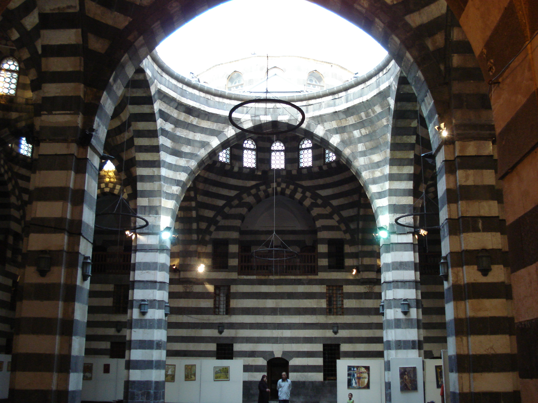 خان أسعد باشا في دمشق القديمة